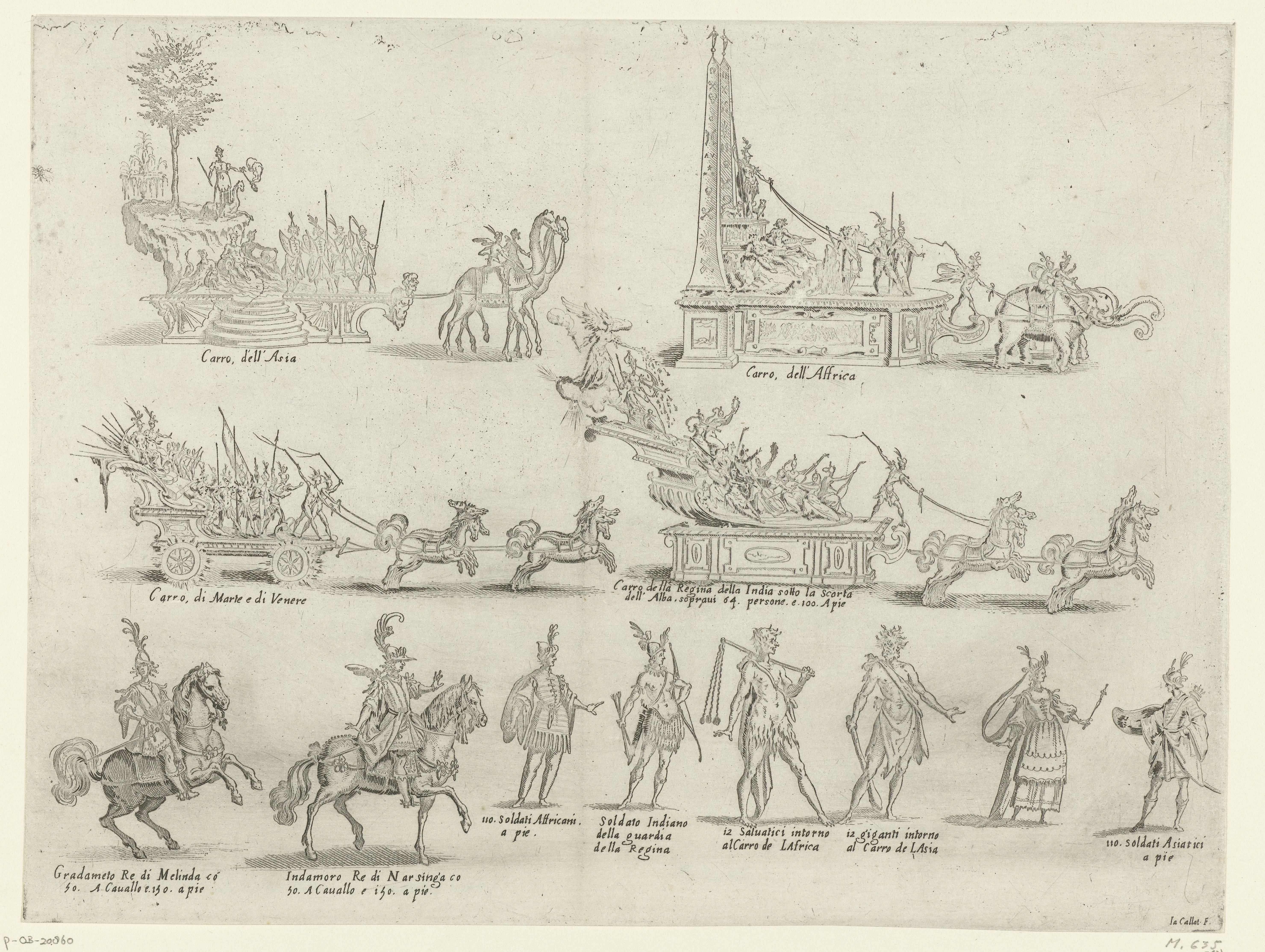 IdentificatieTitel(s): Carnaval te Florence: praalwagens en deelnemers aan de optochtObjecttype: prent Objectnummer: RP-P-OB-20.860Catalogusreferentie: Meaume 635Lieure 169-1(2)Opschriften / Merken: verzamelaarsmerk, verso linksonder, gestempeld: Lugt 240Omschrijving: Vier praalwagens (voorstellende/meevoerende Azië, Afrika, Mars & Venus, en de Koningin van India), twee ruiters en zes personages te voet, vrijwel allemaal met een toelichtende tekst in het Italiaans. Deze wagens en figuren reden en liepen mee in de optocht die plaatsvond tijdens het carnavalsfeest 'Guerra d'Amore', dat Cosimo II de' Medici in 1616 in Florence gaf.VervaardigingVervaardiger: prentmaker: Jacques Callot (vermeld op object)naar ontwerp van: Giulio Parigiuitgever: Zanobi PignoniPlaats vervaardiging: FlorenceDatering: 1616Fysieke kenmerken: etsMateriaal: papier Techniek: etsenAfmetingen: blad: h 227 mm × b 300 mmToelichtingGebruikt als illustratie in: Andrea Salvadori, ‘Guerra d'Amore. Festa del Serenissimo Gran Duca di Toscana Cosimo Secondo' (Florence: Zanobi Pignoni, 1616). Klinkert, C.OnderwerpWat: Carnival, Shrovetide (non-liturgical celebration)chariot, triumphal car(story of) Mars (Ares)(story of) Venus (Aphrodite)Wanneer: 1616 - 1616Waar: FlorencePiazza Santa CroceWie: Cosimo II de'MediciVerwerving en rechtenVerwerving: overdracht van beheer 1816Copyright: Publiek domein